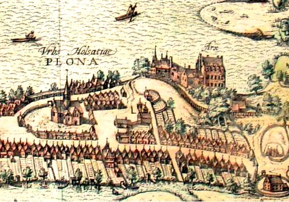 Plön Schloss 1595, Stich Braun/Hogenberg, Ausschnitt